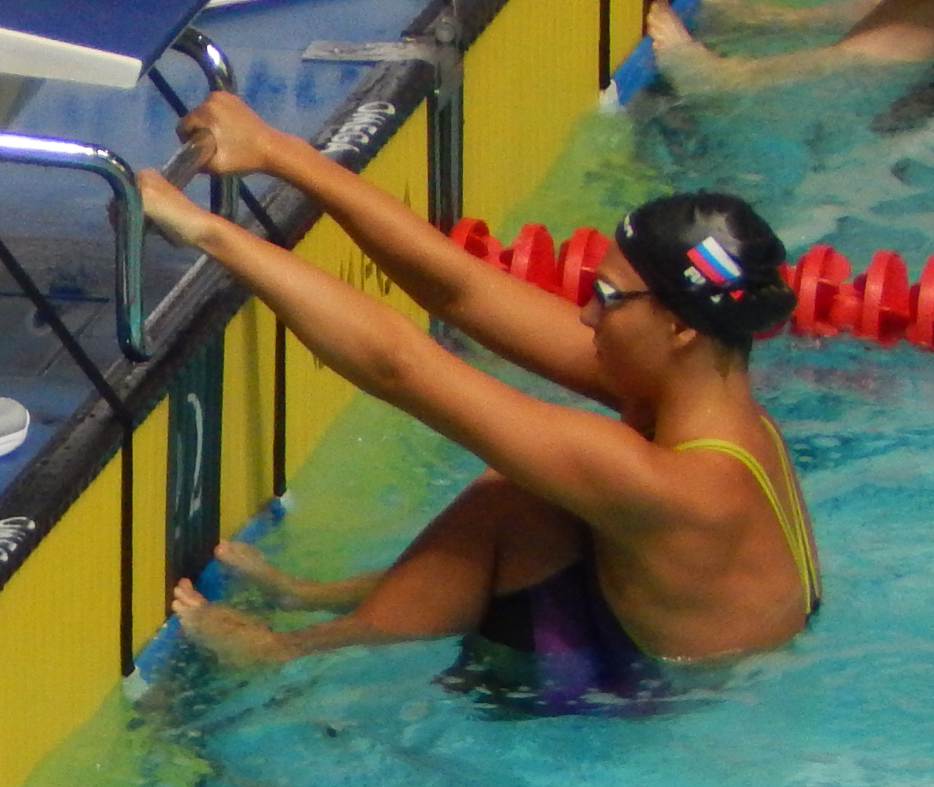 Чемпионат России по плаванию 2018, второй полуфинал на дистанции 50 метров на спине. Дорожка 2 - Анастасия Авдеева (Владимирская область)